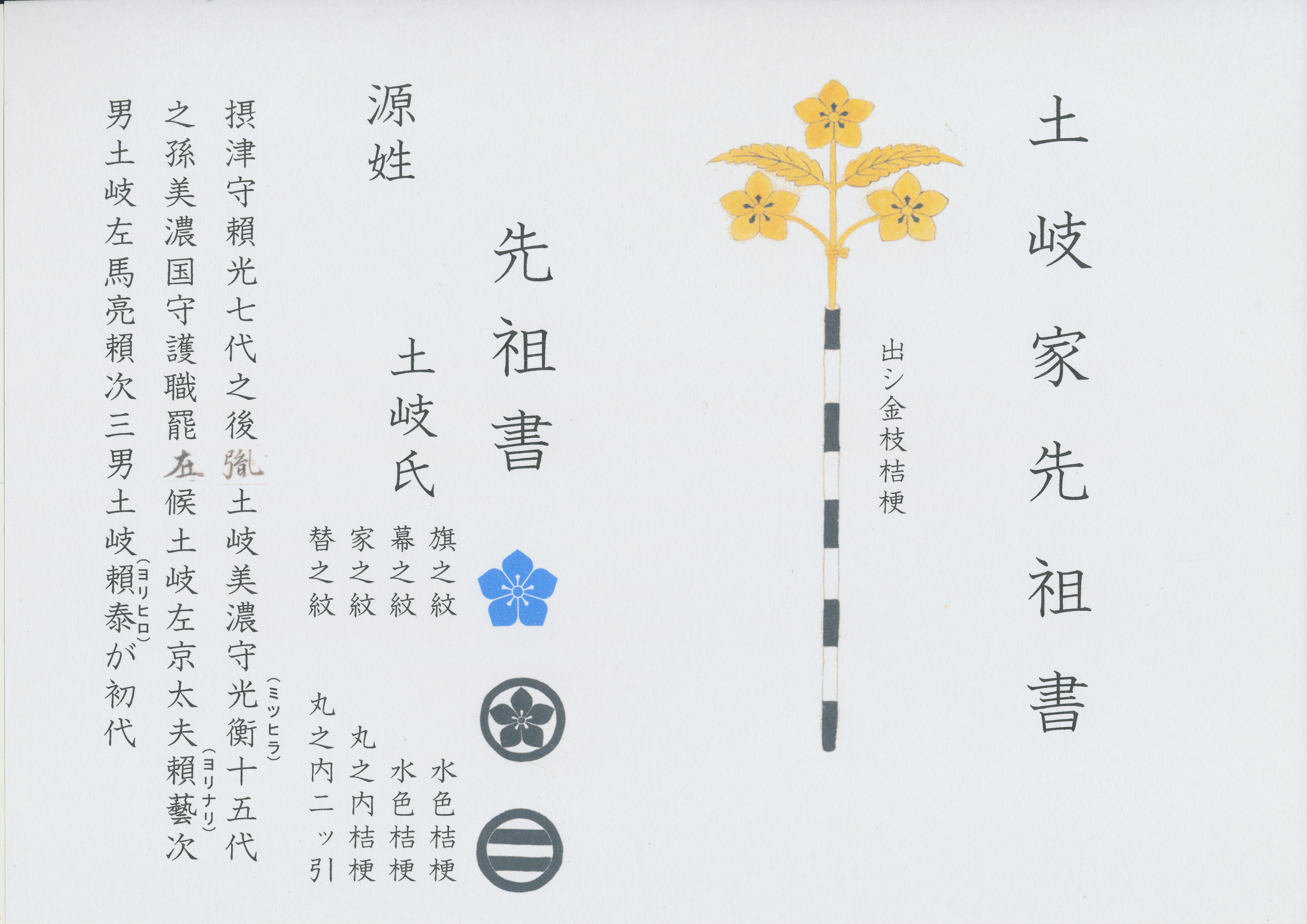 家紋種類